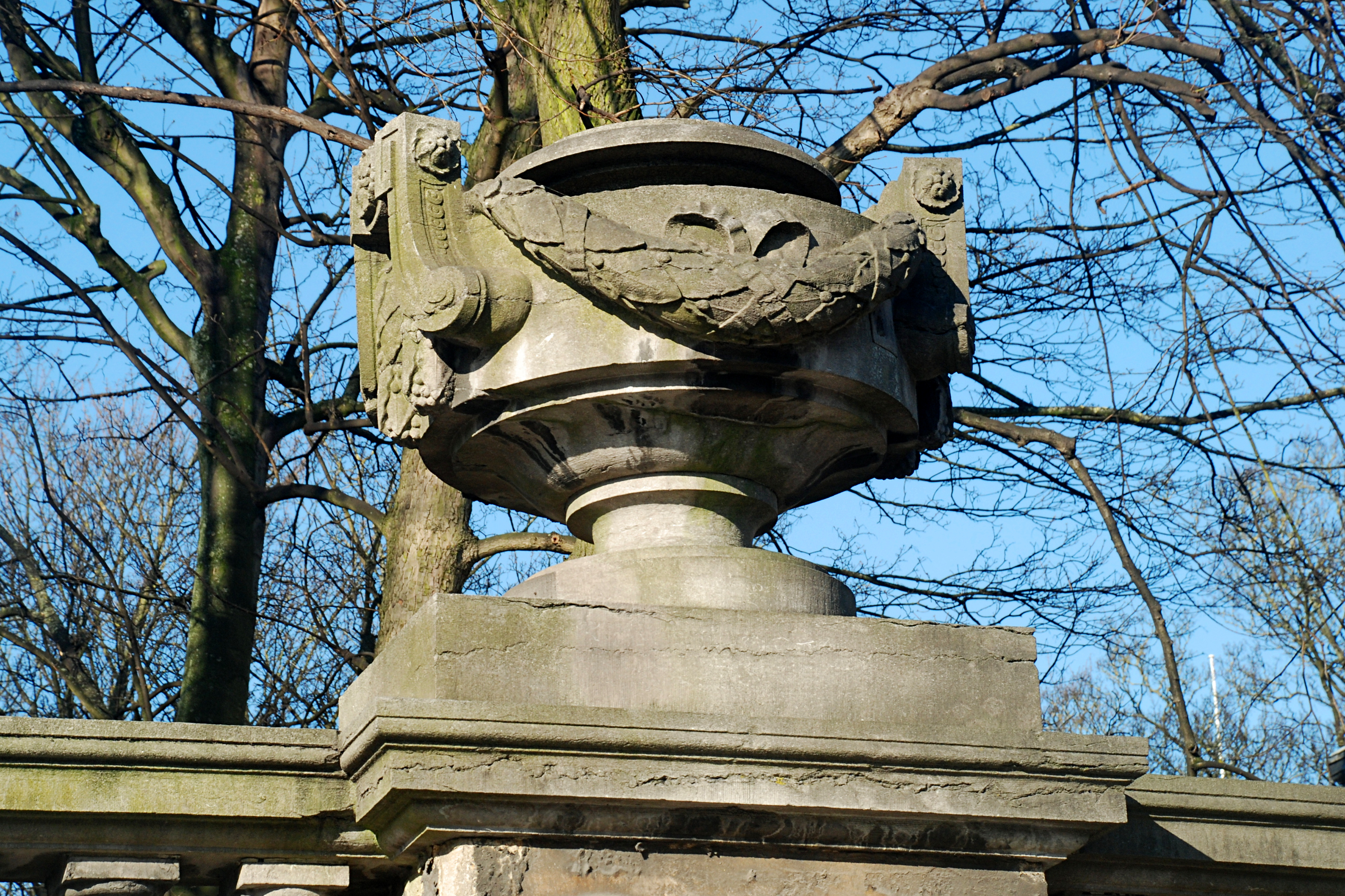 Belgique - Bruxelles - Hôtel de la Liste civile - Vase en pierre du mur de clôture